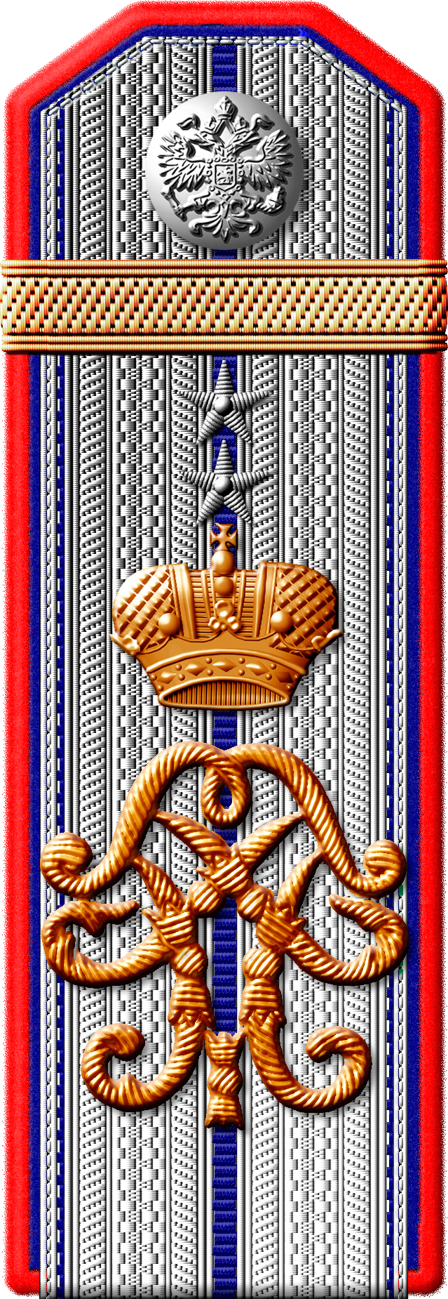 Российская Империя. Российская Императорская армия Род войск/службы: Императорская Военно-медицинская академия Знаки различия: погоны. Слушатель специальных курсов Императорской Военно-медицинской академии (погон образца апреля 1913 года) с правами зауряд-врача. Офицер запаса, зачисленный слушателем подготовительных курсов ИВМА, состоявших на правах вольноопределяющегося (погон образца 1914 года) Первичные источники: Полное собрание законов Российской империи собр. 3, №38991 от 16 марта 1913 г. Приказ по Военному Ведомству № 152 от 02.034.1913 г. Санкт-Петербург, по Главному Военно-Санитарному Управленiю Вторичные источники: Сологуб Кирилл (текст), Васильев Кирилл (рисунки) Погоны зауряд-военных чиновников Российской императорской армии (ответы на вопросы и вопросы без ответов) (рус.) // Петербургский коллекционер: журнал. — СПб., 2012. — № 2 (70). — С. 80-85. — (рис.12, исправлен автором) Сологуб К. Н. (текст), Васильев К. С. (рисунки). Форменная одежда студентов Императорской медико-хирургической (Военно-медицинской) академии // Вестник Российской военно-медицинской академии : журнал. — Санкт-Петербург: Федеральное государственное бюджетное военное образовательное учреждение высшего образования «Военно-медицинская академия имени С.М.Кирова» Министерства обороны Российской Федерации, 2013. — № 2 (42). — С. 224. — ISSN 1682-73-92.